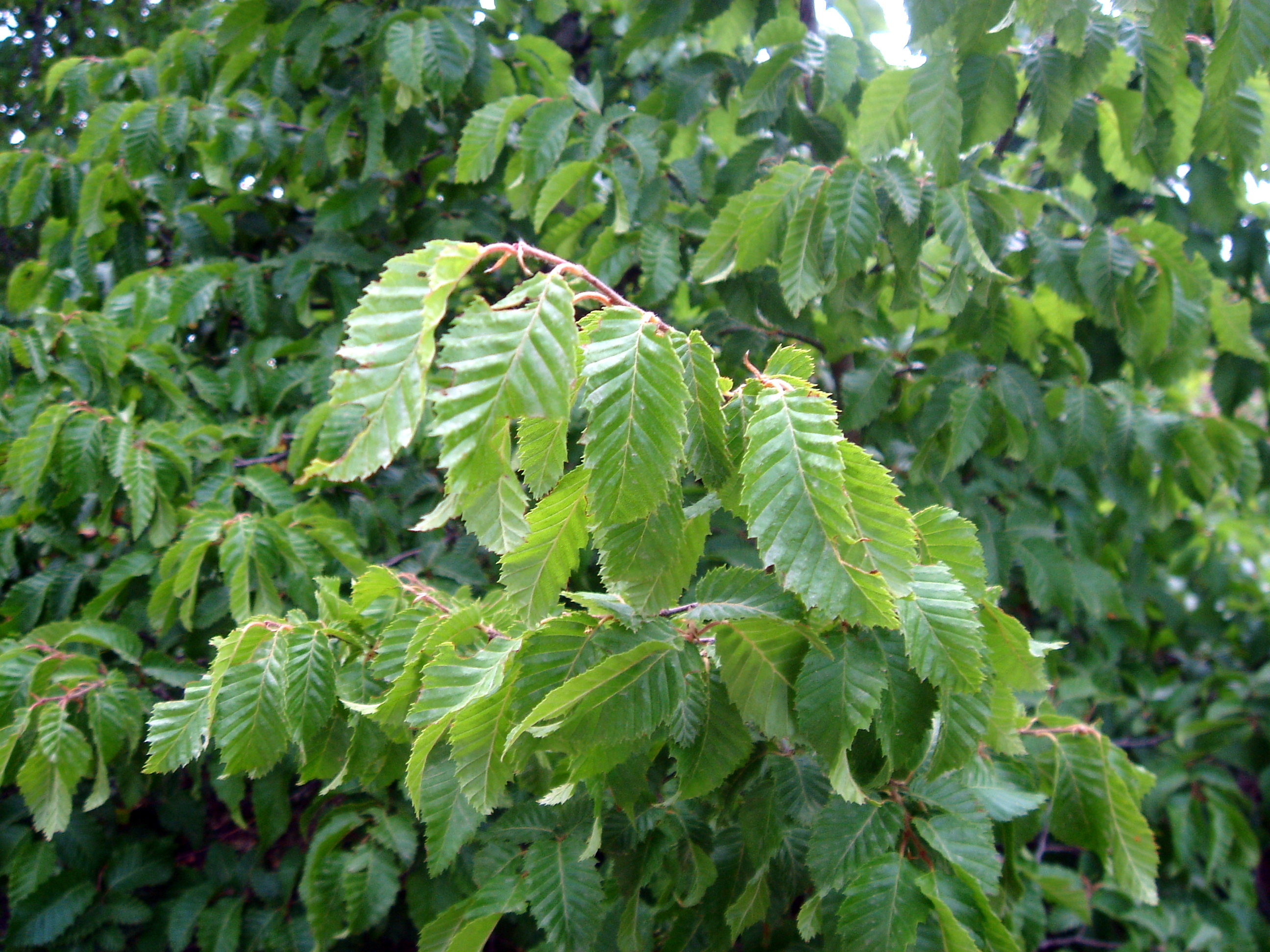 Doğu gürgeni (Carpinus orientalis)